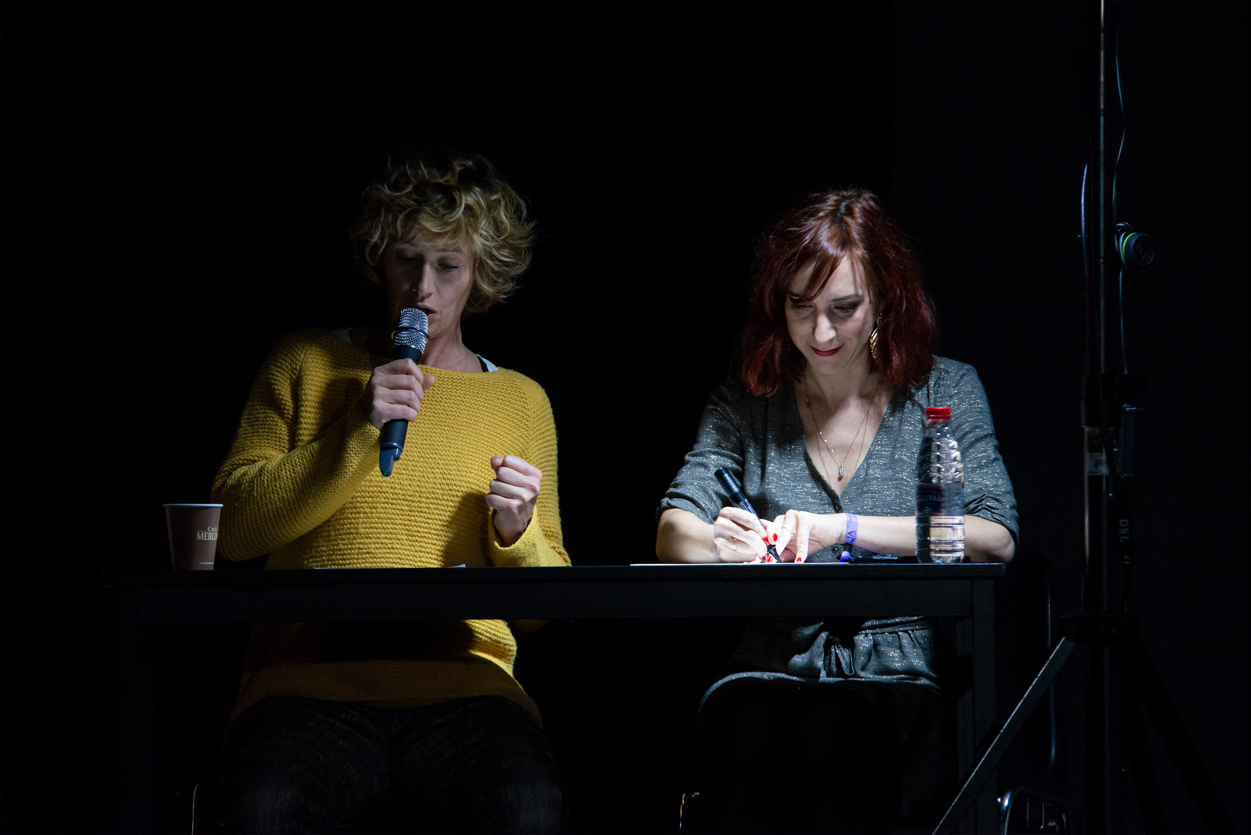 Cécile de France et Pénélope Bagieu à l'avant-première de Culottées, Festival International de la Bande Dessinée d'Angoulême 2020.